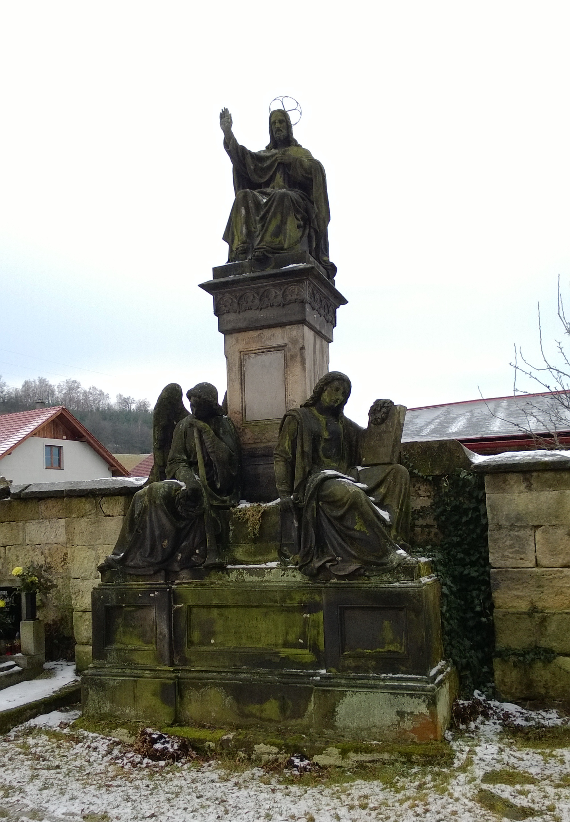 Pískovcový náhrobek rodiny Spietschka od Josefa Maxe z roku 1855. Památkově chráněno v rámci areálu kostela sv. Prokopa.